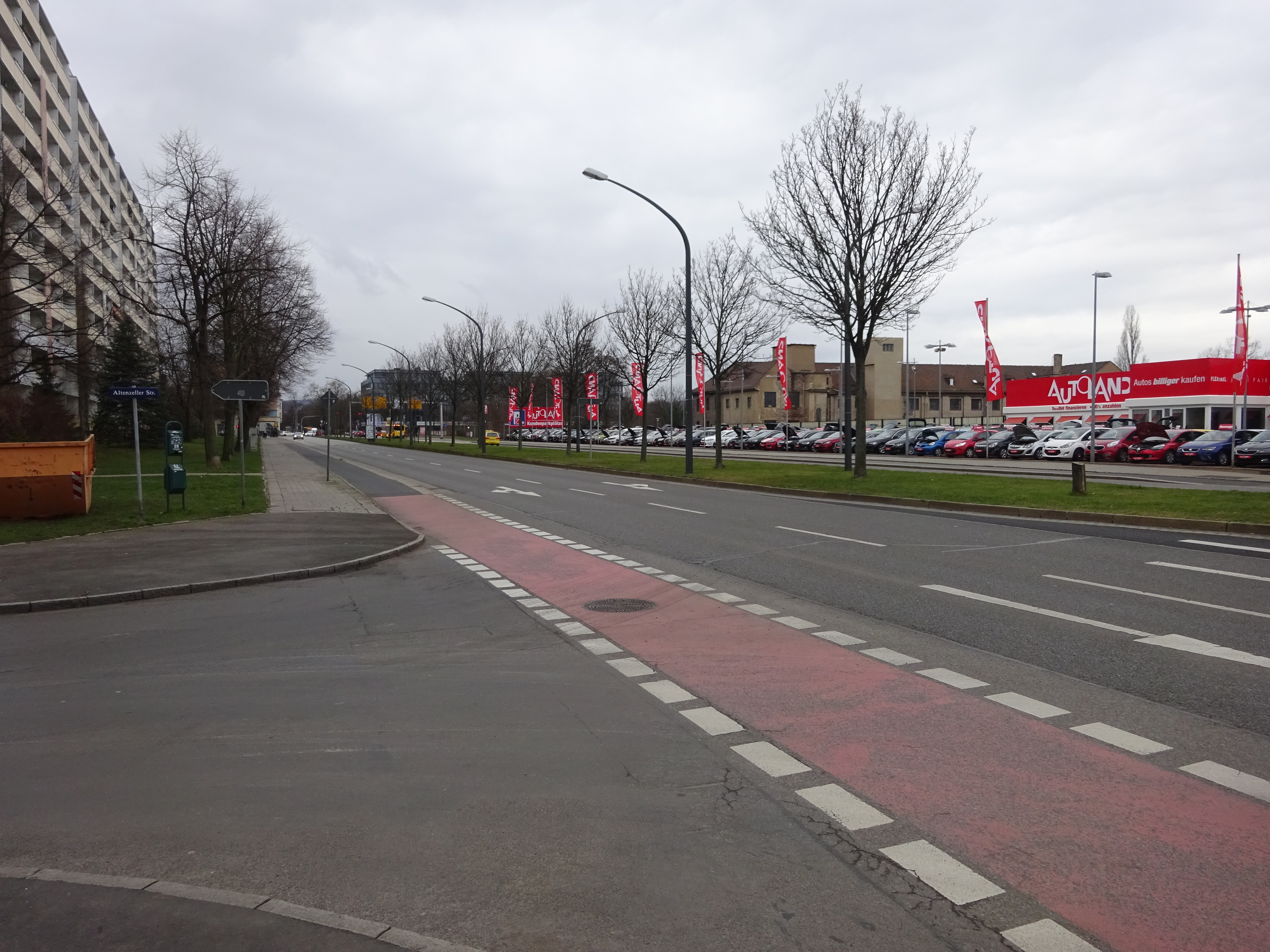 Ansicht der Budapester Straße in Dresden in Höhe der Einmündung Altenzeller Straße, Blick in Richtung Chemnitzer Straße